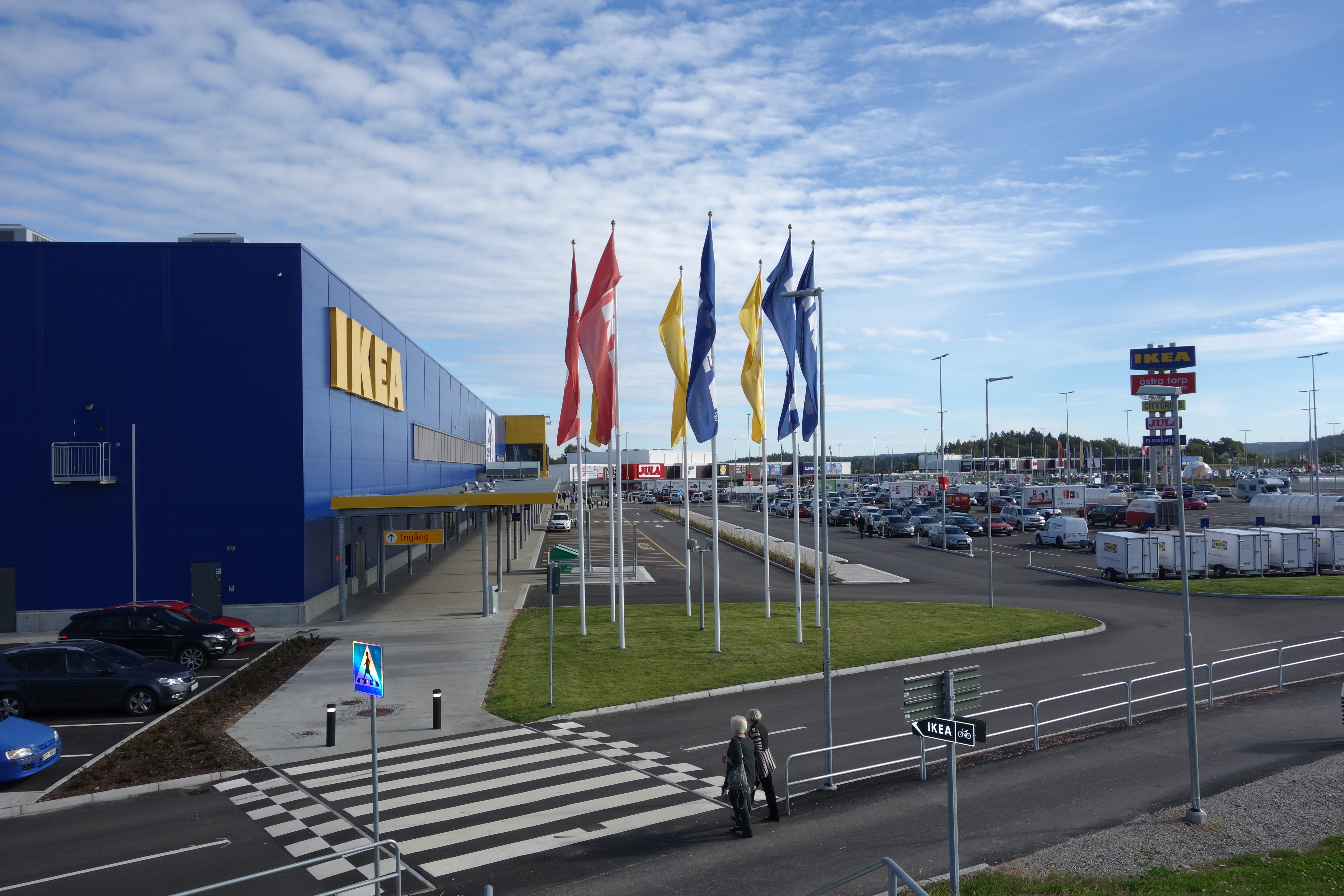 Östra Torp köpcentrum Uddevalla